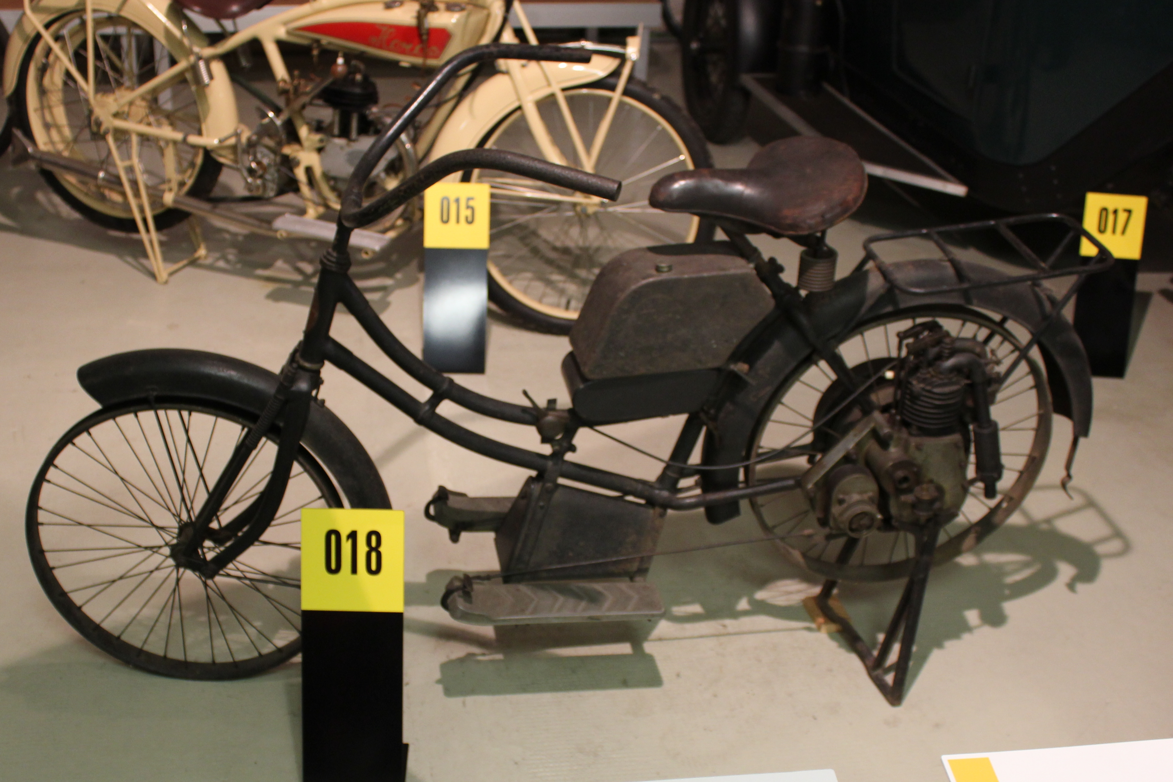 ORUK-Motorrad, Exponat Museum für sächsische Fahrzeuge